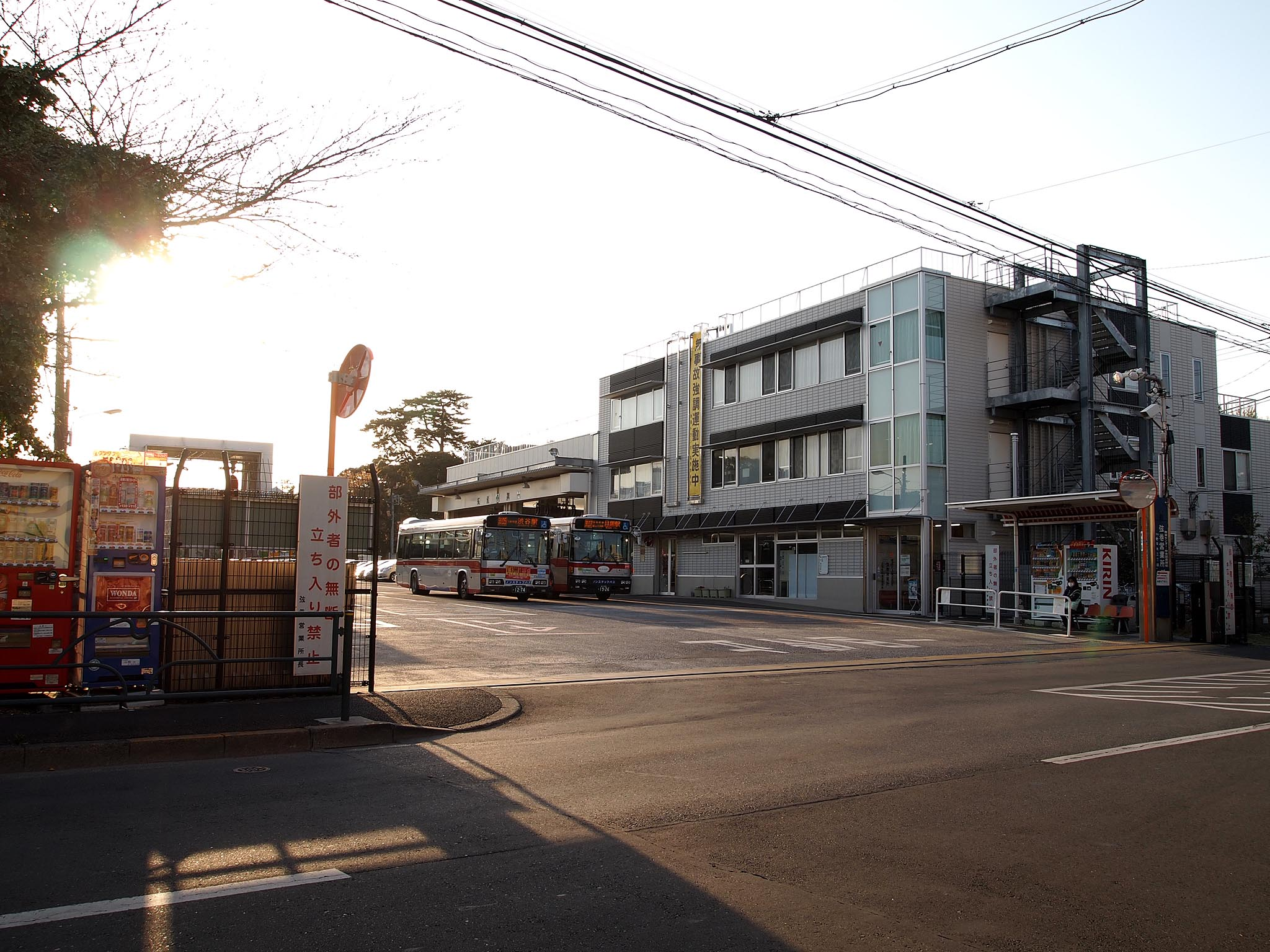 2009年に建て替えられた東急バス弦巻営業所。